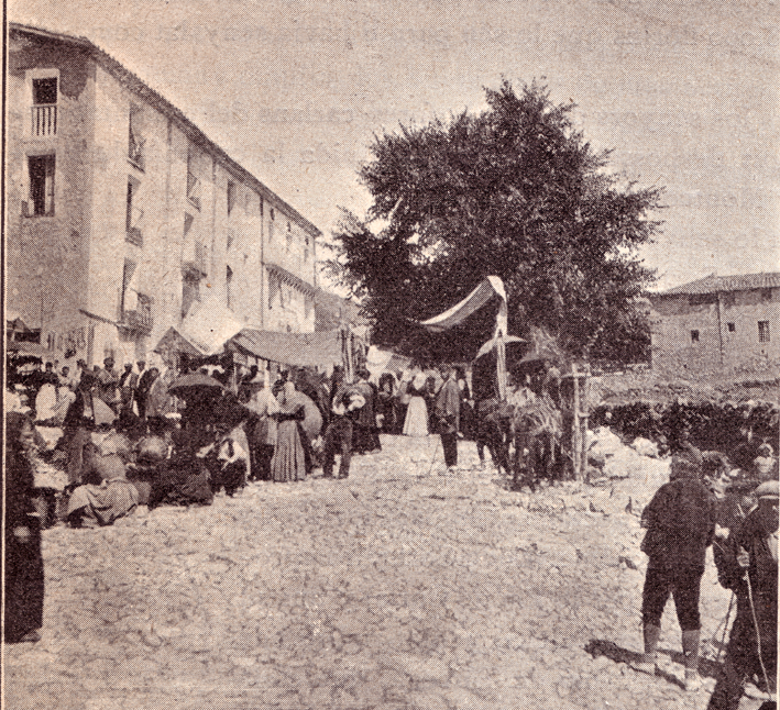 El Firal de la Pobleta de Bellveí, de vers el 1910 (la Torre de Cabdella, Pallars Jussà)